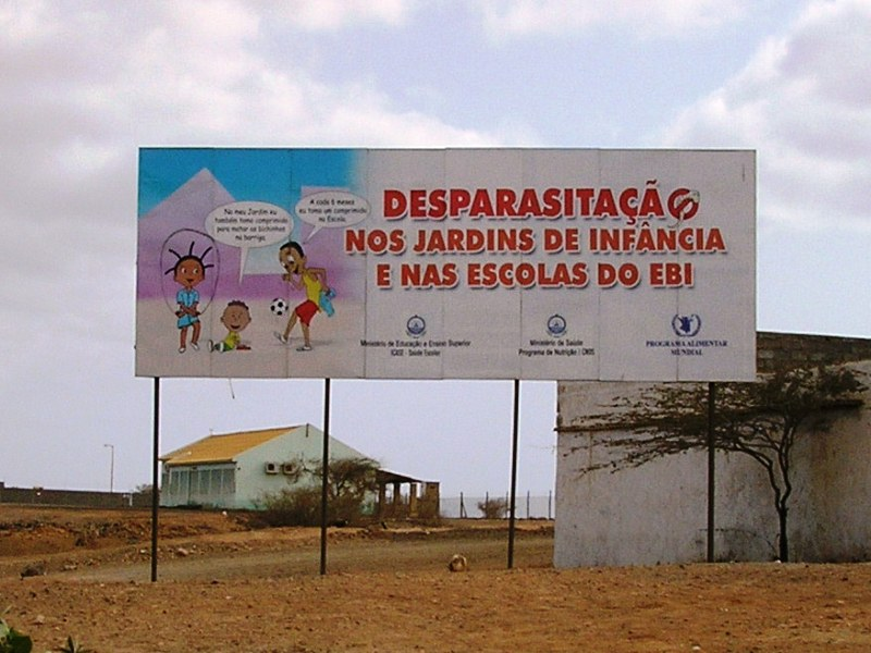 Billboard, Sal island, Cape Verde